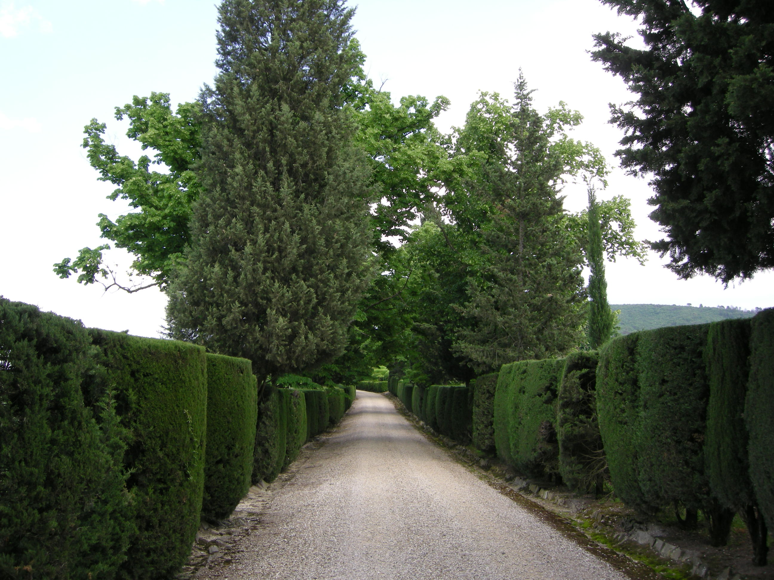 Villa il palagio di riomaggio, ingresso